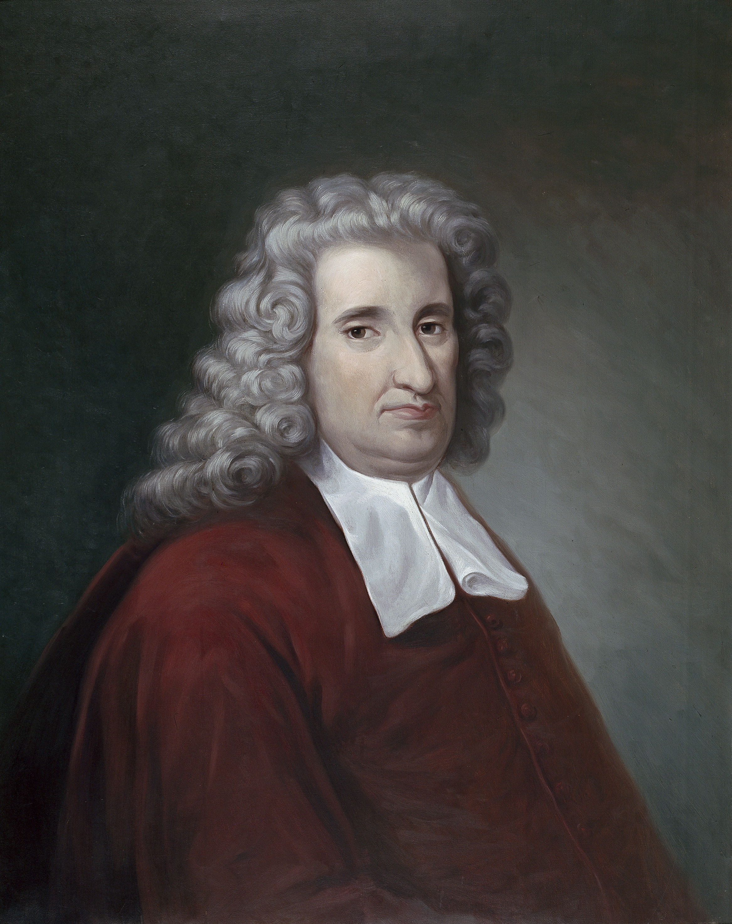 Retrato del cardenal italiano Giulio Alberoni (1664-1752), que llegó a ser el principal consejero del rey Felipe V de España.